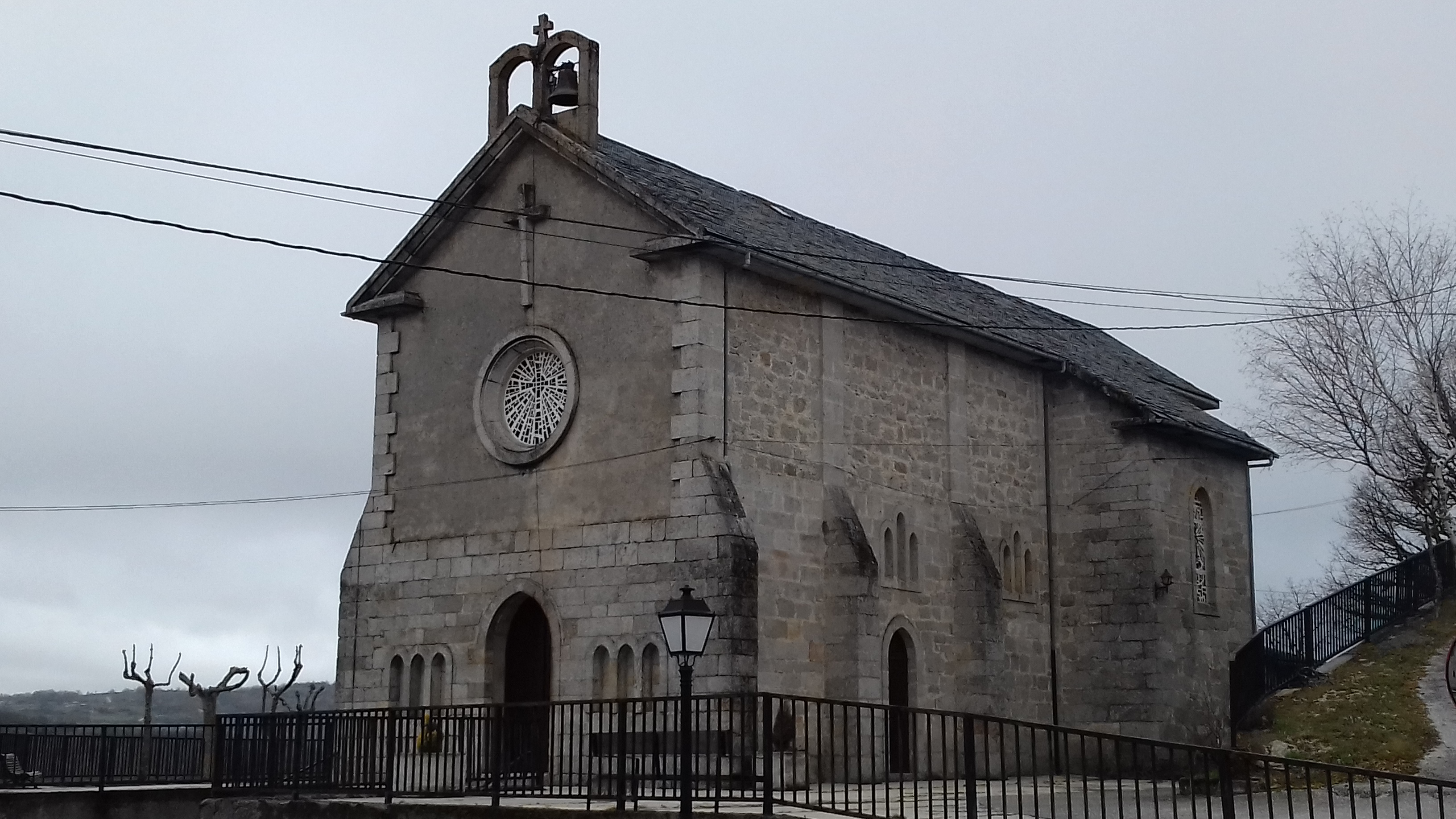 Igrexa parroquial da Veiga